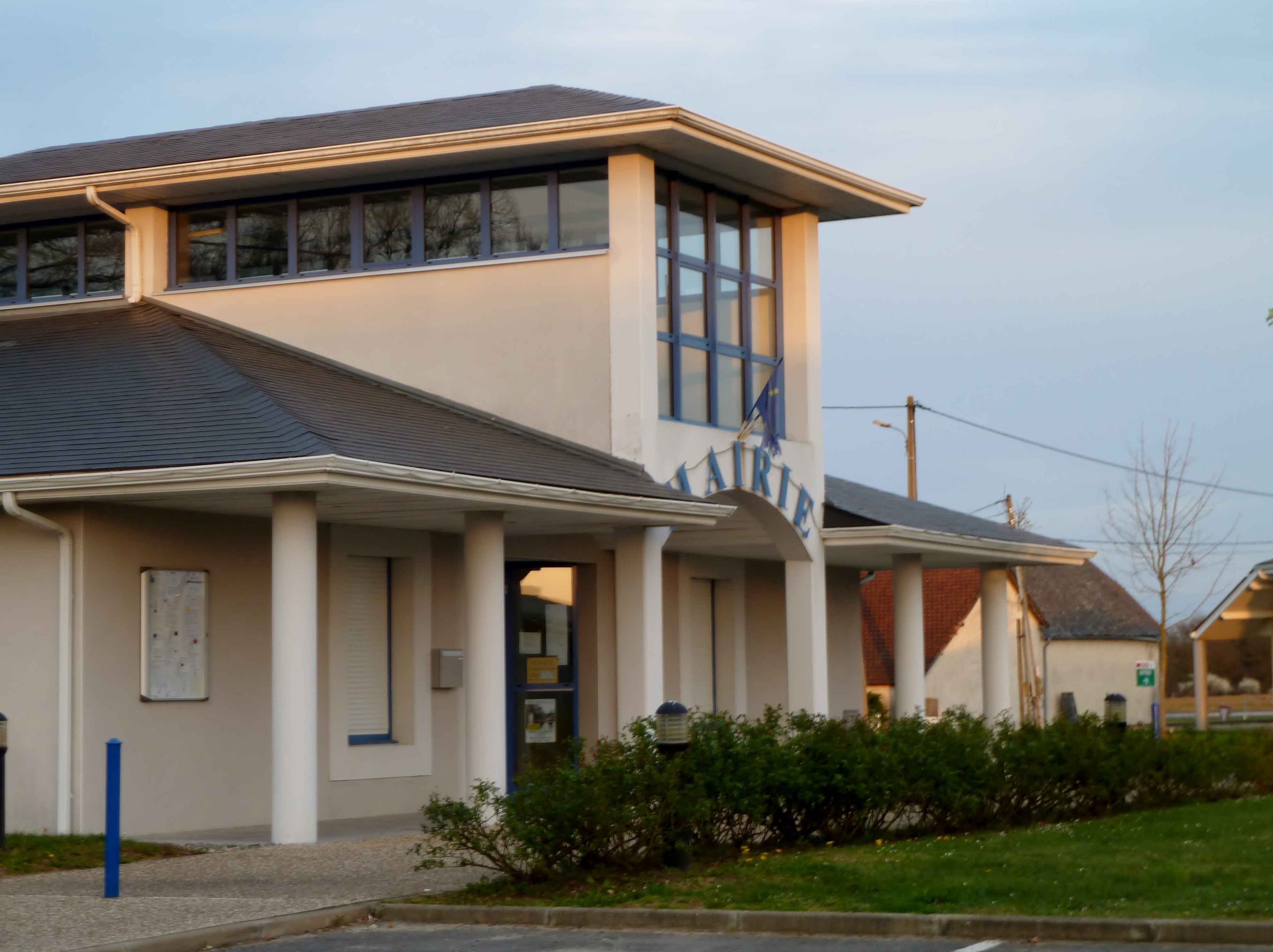 Mairie d'Astis